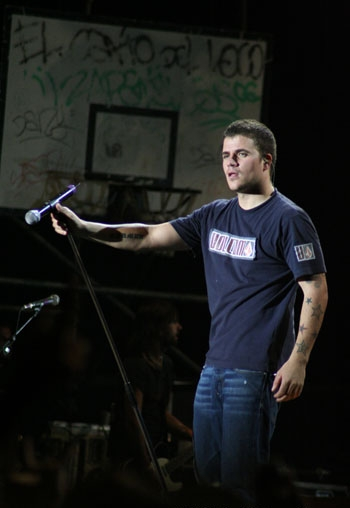 Dani Martin, cantante del grupo El Canto del Loco